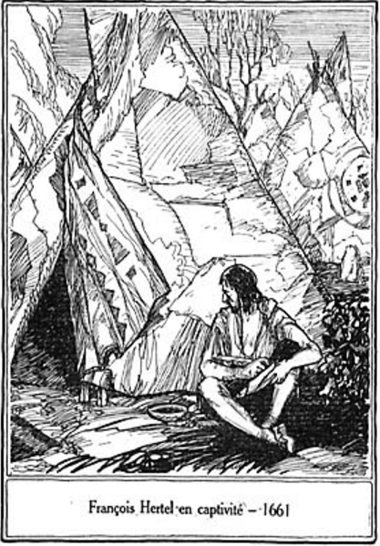 François Hertel en captivité - 1661